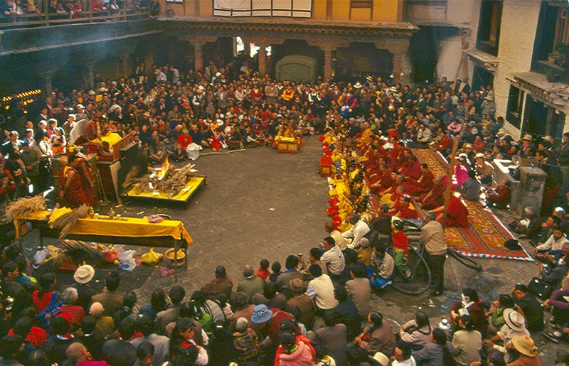 Temple de Jokhang. Lhasa, Tibet